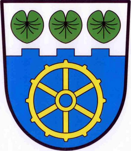 Černíč, znak obce